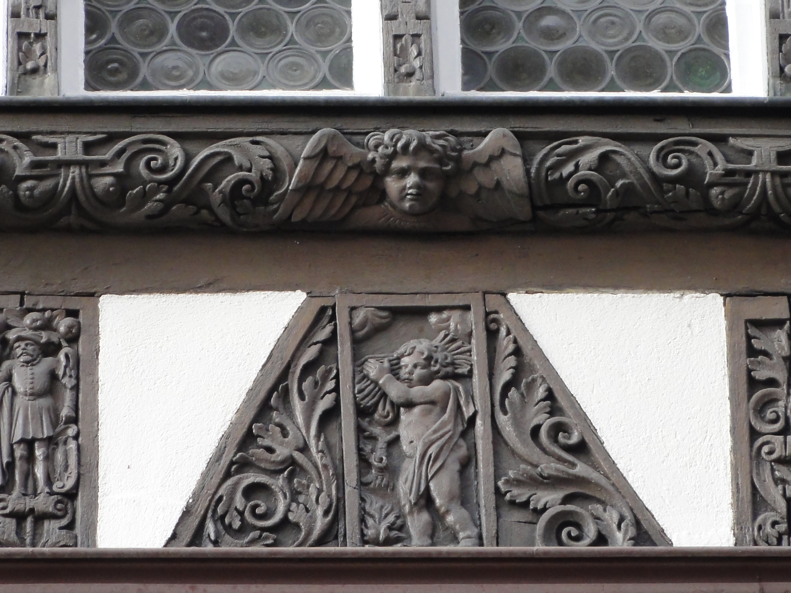 Alsace, Bas-Rhin, Strasbourg, Lycée internationnal des Pontonniers (1902), 1 rue des Pontonniers. .